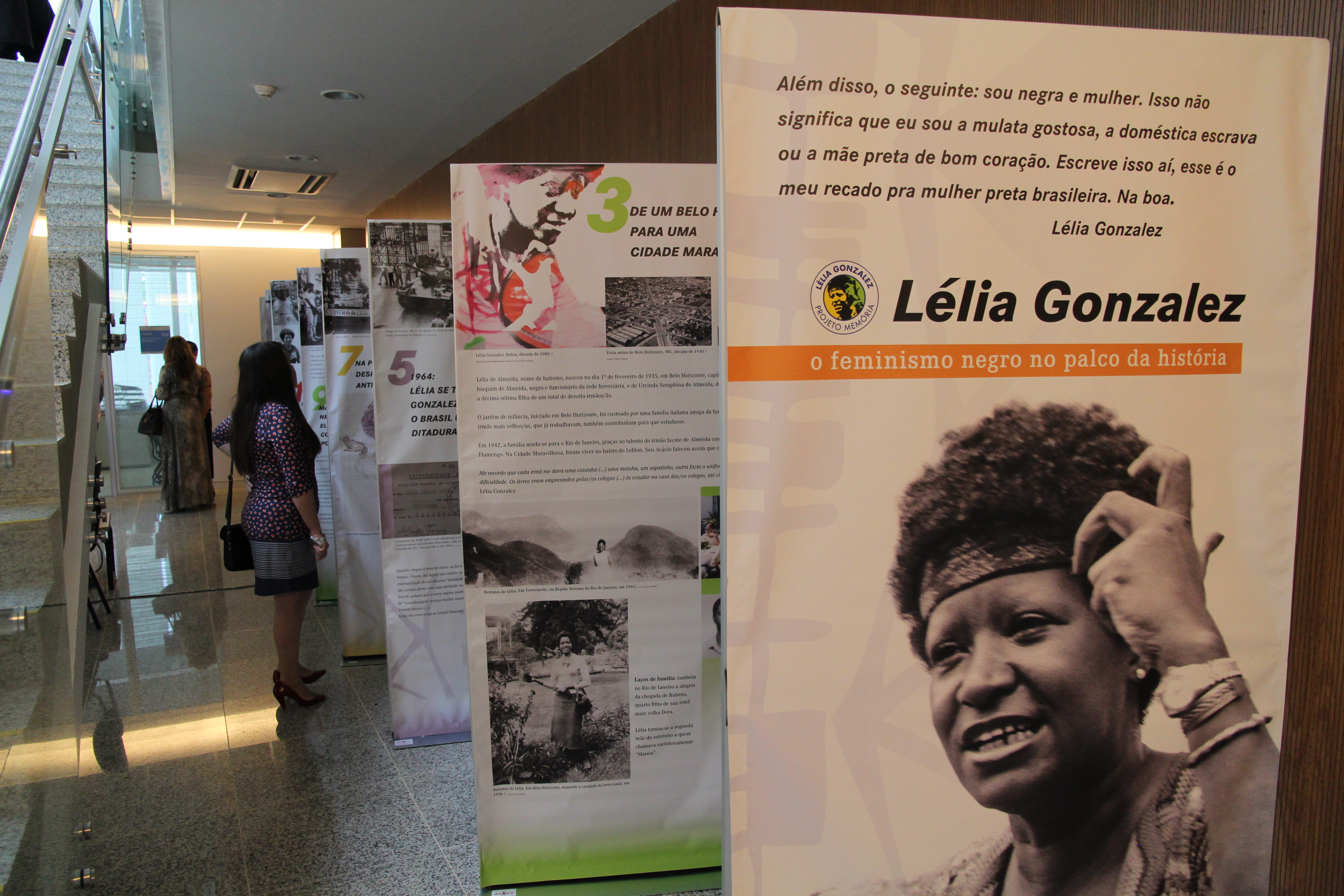 Foto: Fábio Donato/PNUD Brasil.